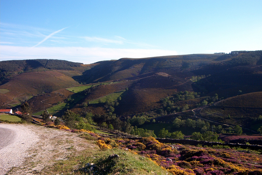 Paisagem da estrada entre Salto e Boticas em plena serra do Barroso.